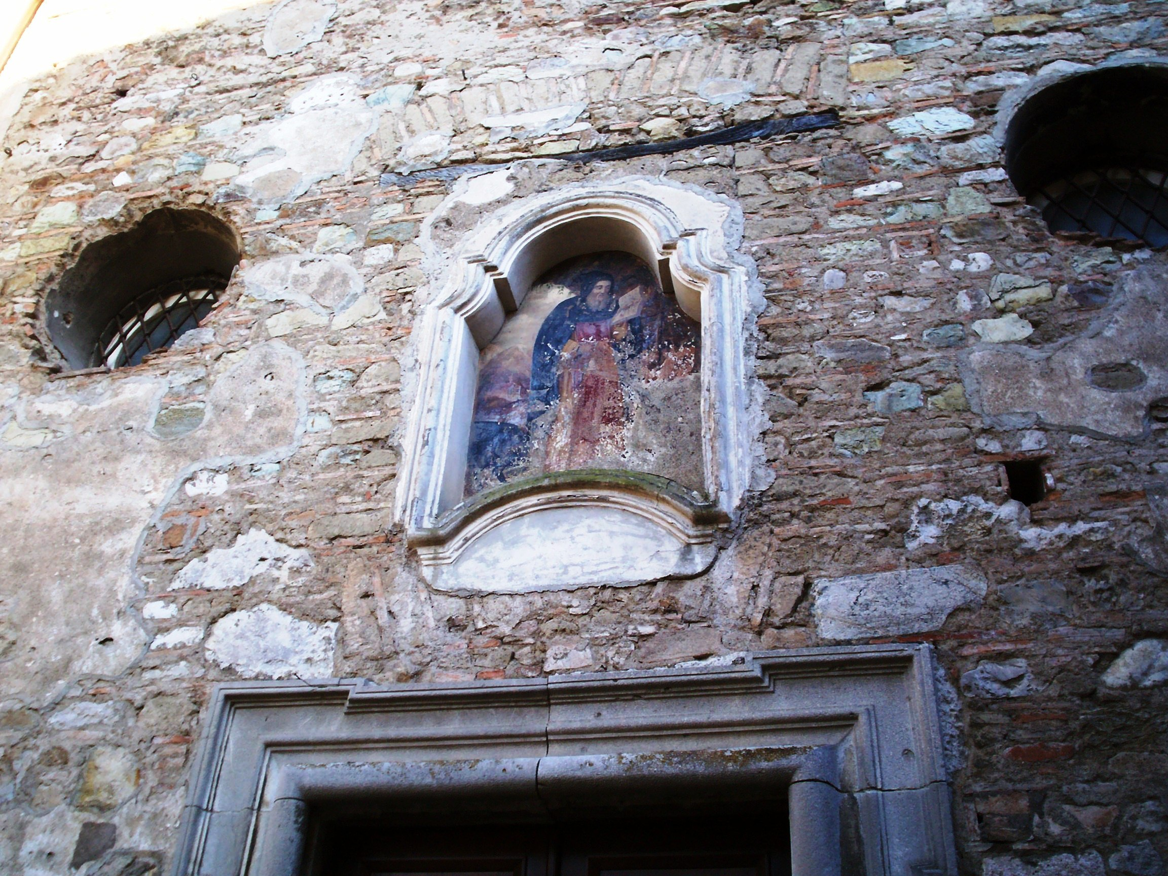 particolare della facciata dell'ex convento degli Agostiniani in Benevento